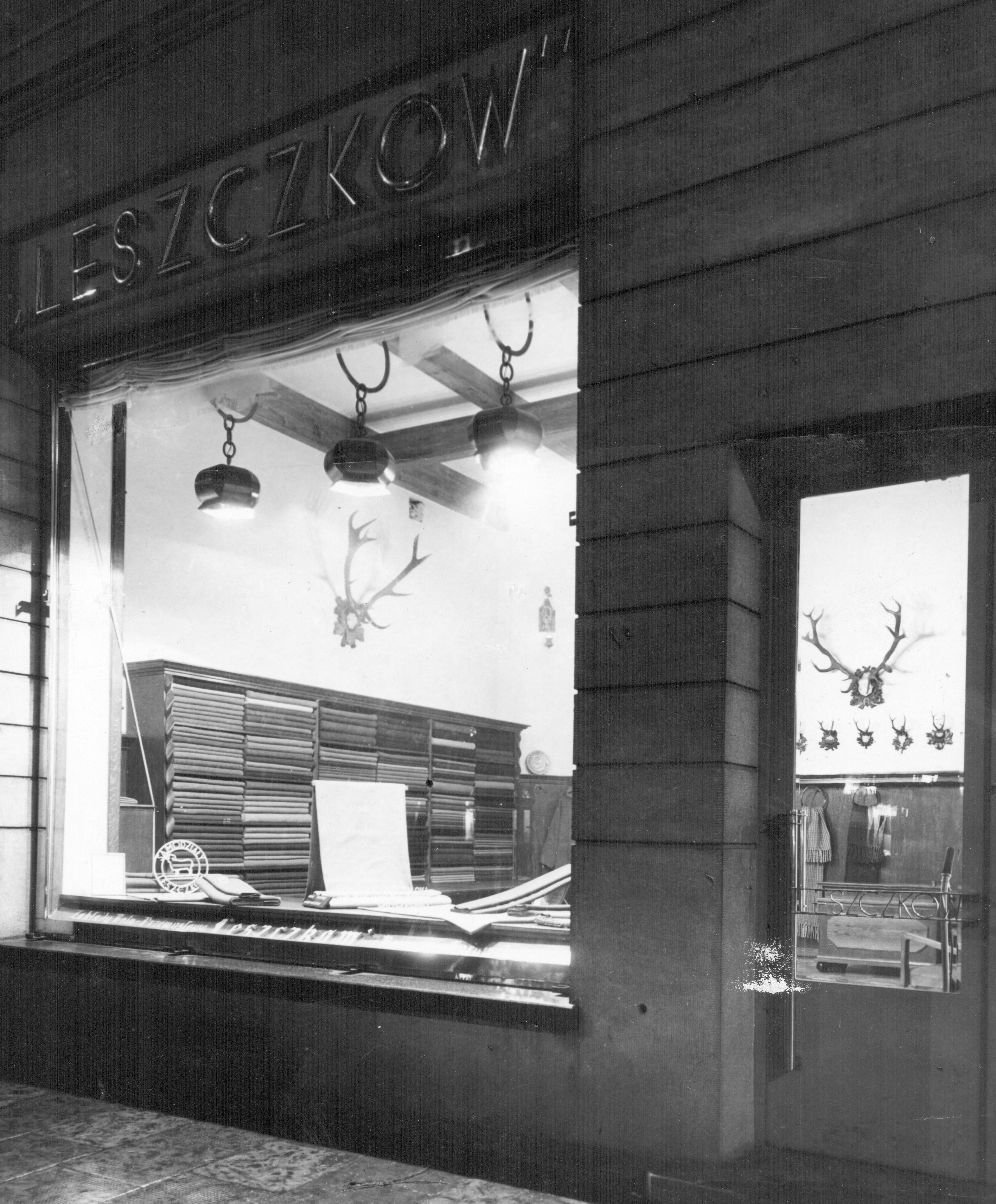 Sklep firmowy Leszczków w Warszawie